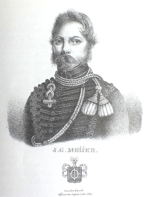 Jacobus Gijsbertus Meijer, litho van P. van den Eijnde